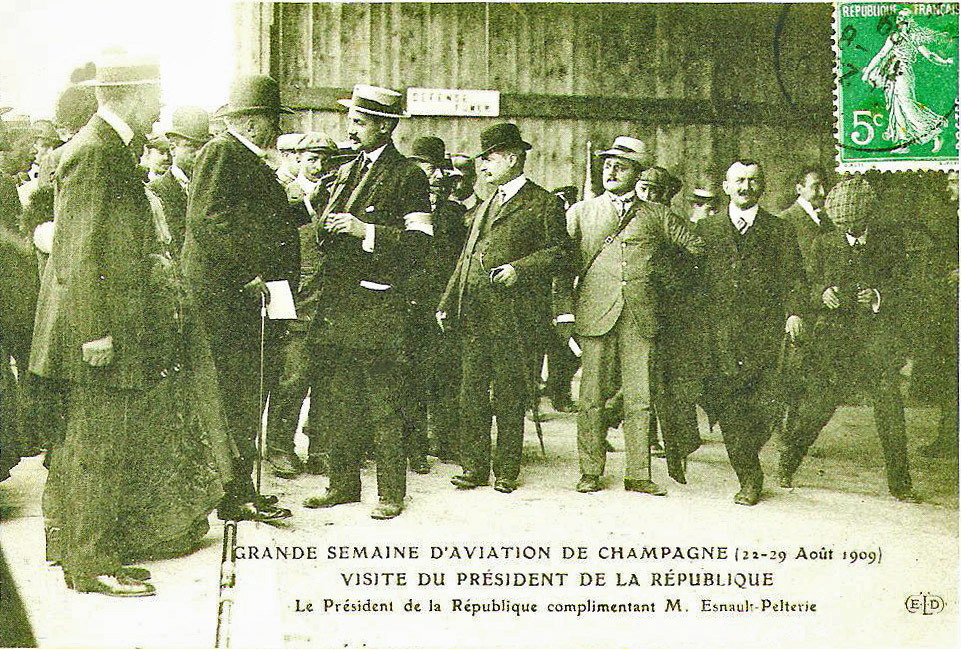 Armand_Fallières_et Esnault_Pelterie.